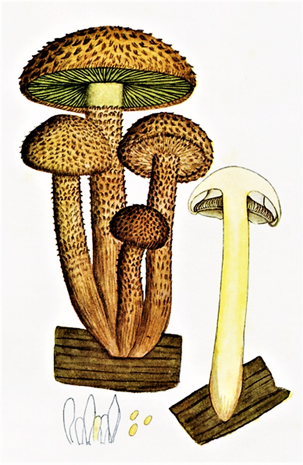 Giacomo Bresadola: Pholiota squarrosa (Vahl, 1770) Kumm. (1871)